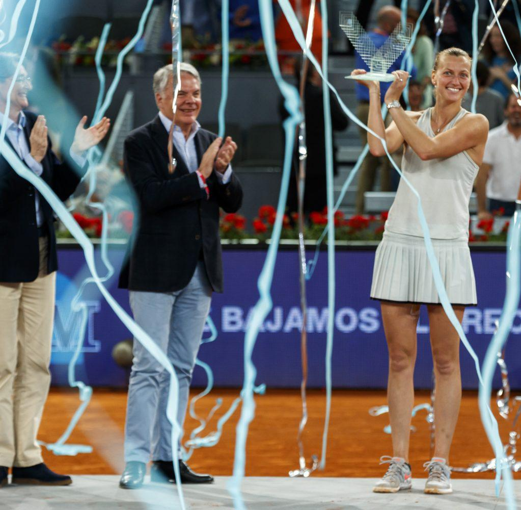 La primera teniente de alcalde del Ayuntamiento de Madrid y concejala de Equidad Derechos Sociales y Empleo, Marta Higueras, ha sido la encargada de entregar anoche el premio a la campeona del Mutua Madrid Open femenino Petra Kvitova, que con esta victoria ha marcado un hito en el torneo madrileño: se ha convertido en la primera tenista que gana tres veces la prueba, por delante de Serena y Halep.